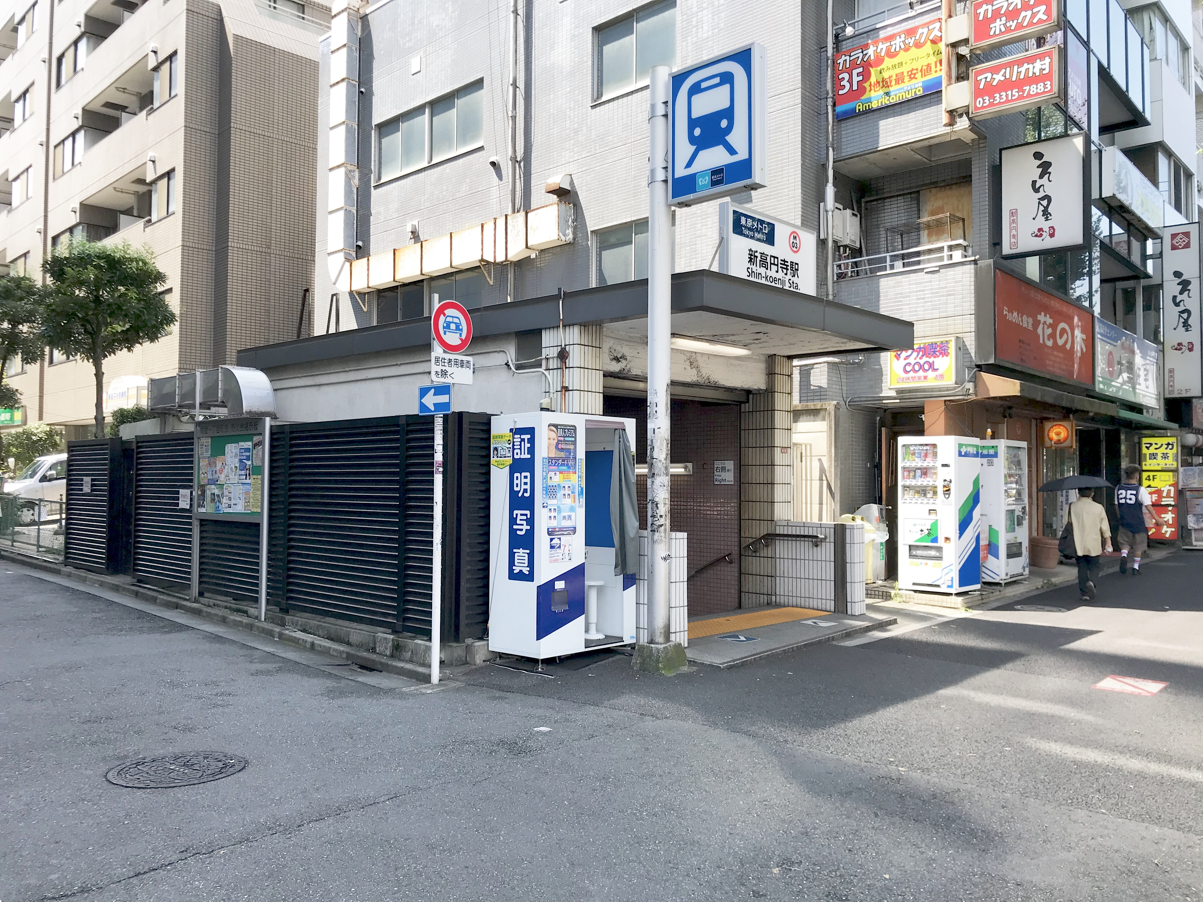 東京メトロ丸ノ内線新高円寺駅1番出入口